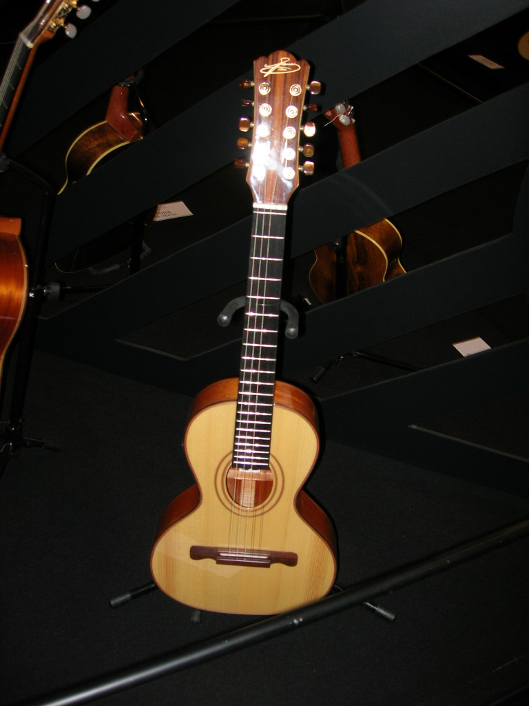 Viola caipira em exposição. Tirada por mim.